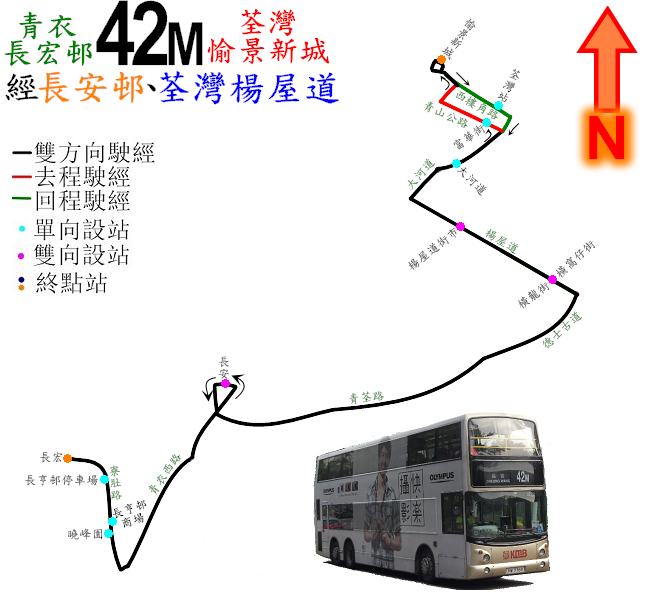 中文（香港）: 九巴42M線的走線圖